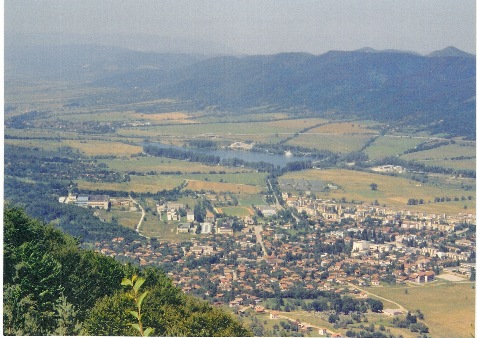 Панорамна гледка към Правец от връх Високата могила